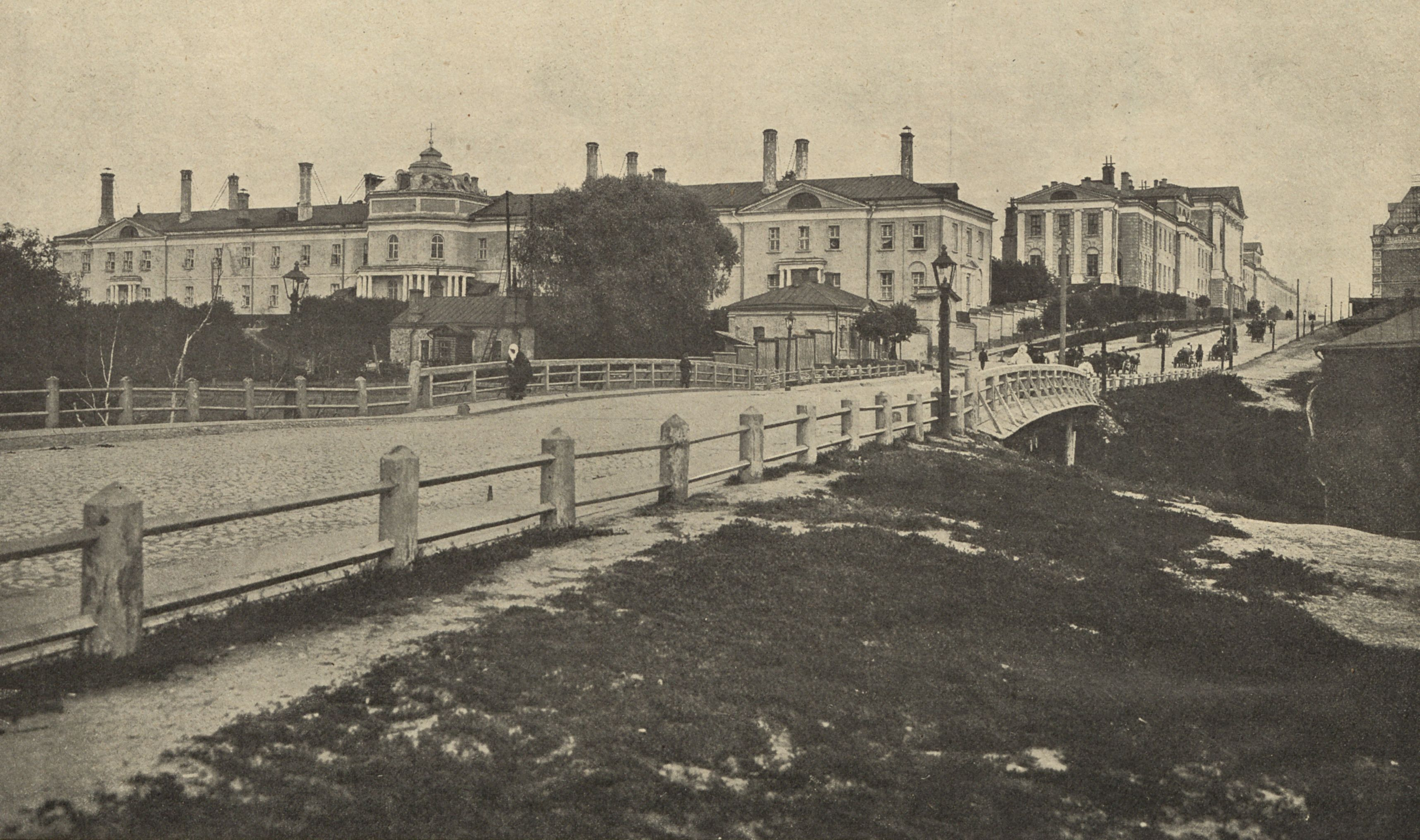 Москва Общий вид здания Московского военного госпиталя им. Бурденко, 1907